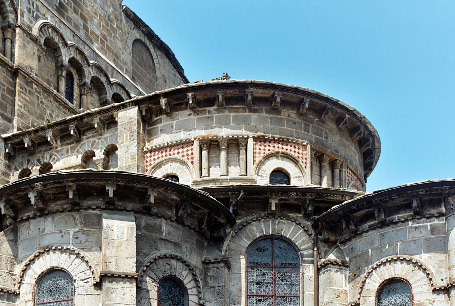 France - Auvergne - Puy-de-Dôme - Basilique Notre-Dame d'Orcival